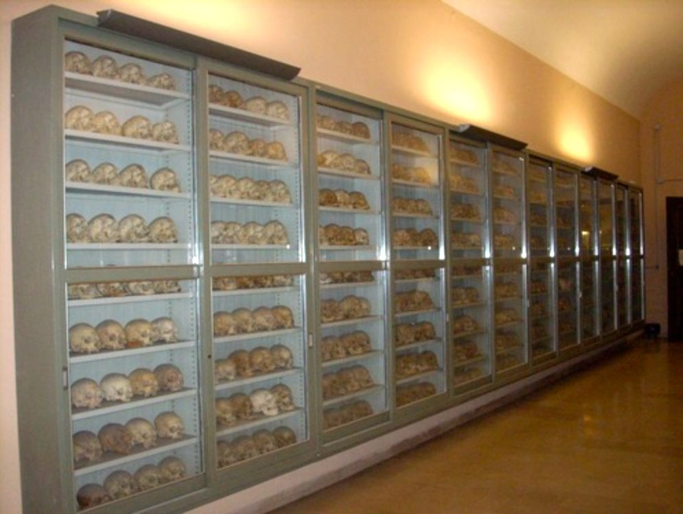 Collezione di oltre duemila crani umani del medico Luigi Calori presente nell'Istituto di Anatomia Umana dell'Università di Bologna